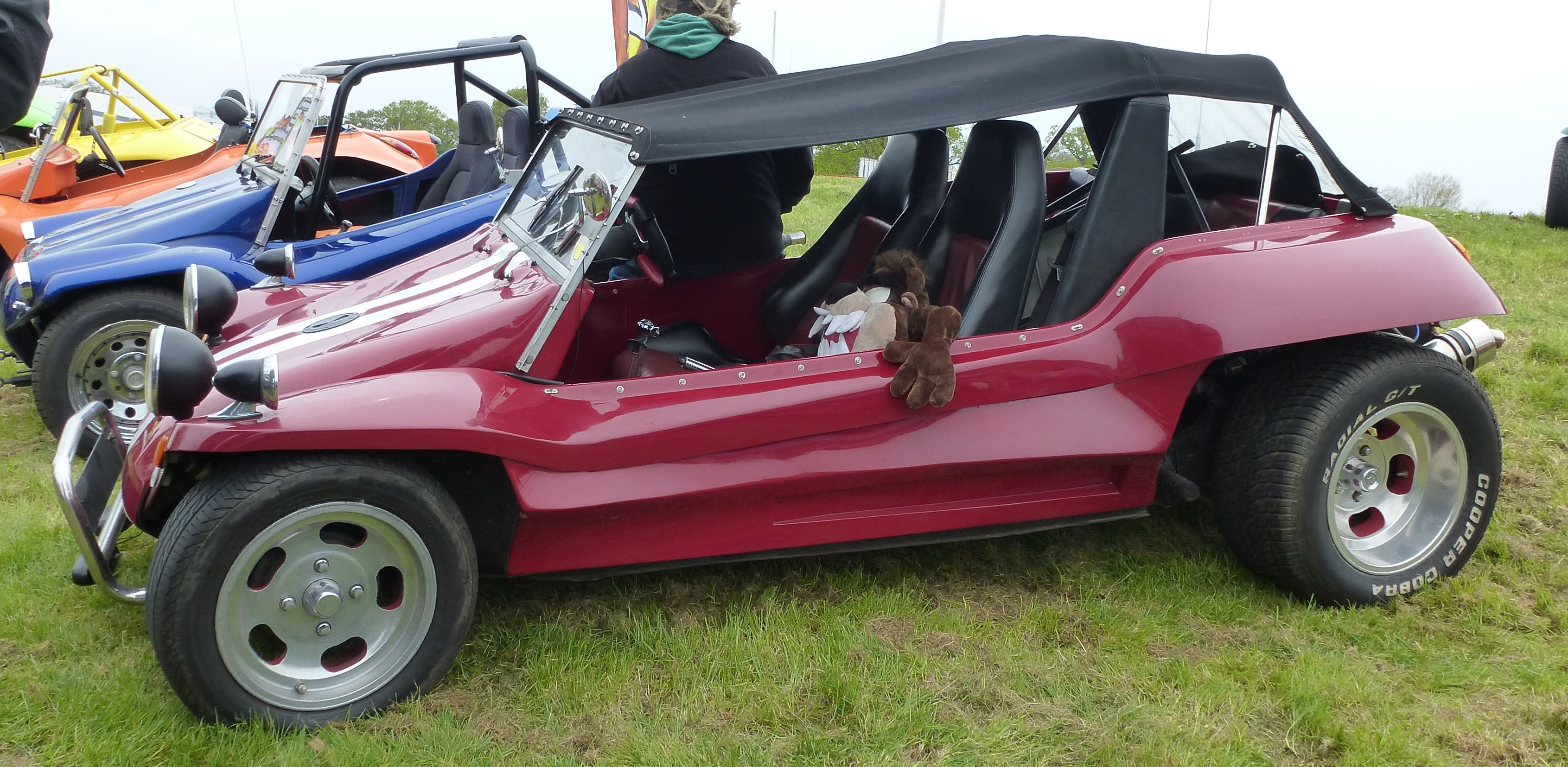 GT Buggy